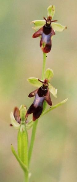 Description : image Utilisateur:Bouba réduction de taille Source : Jeffdelonge Licence : GFDL